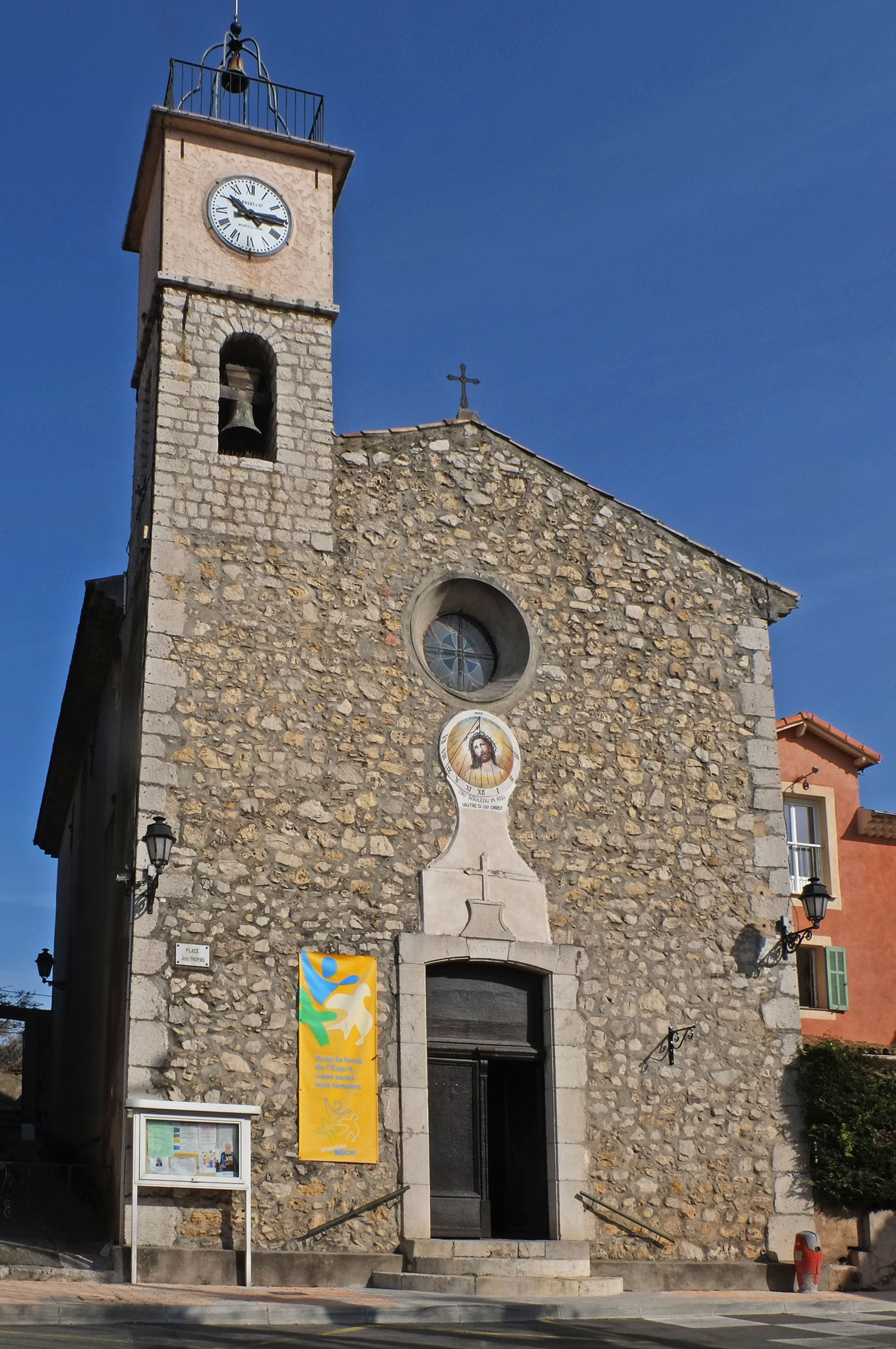 L'église de La Roquette-sur-Siagne